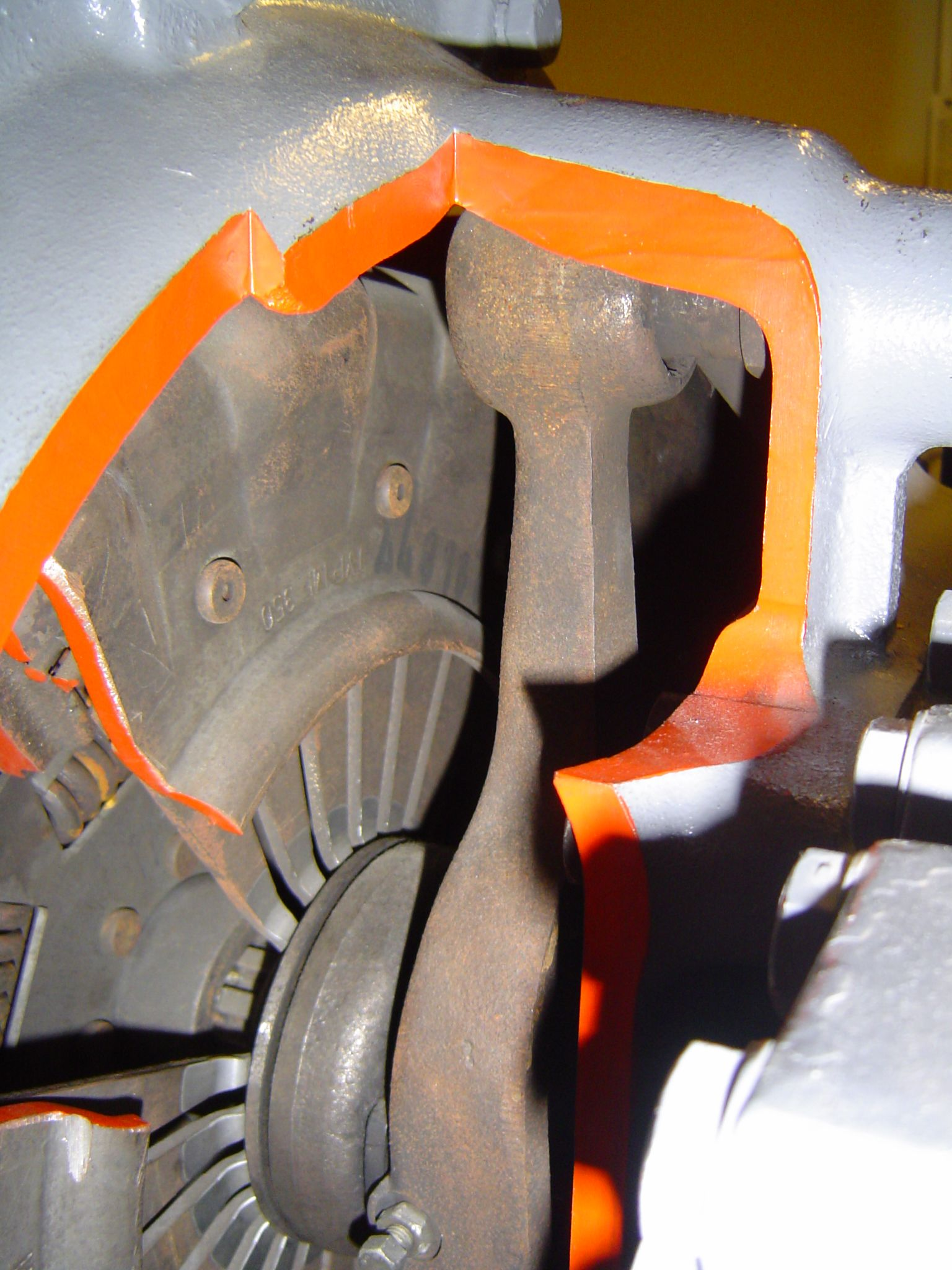 (Opengewerkte) droge plaat koppeling van een vrachtauto